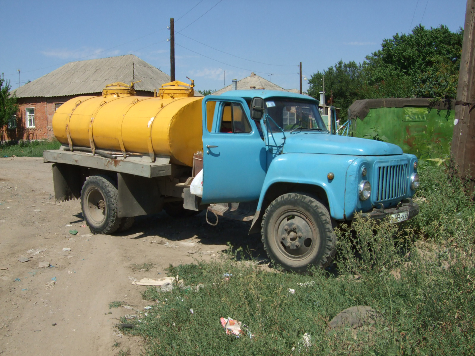 Ein LKW vom Typ GAZ-53